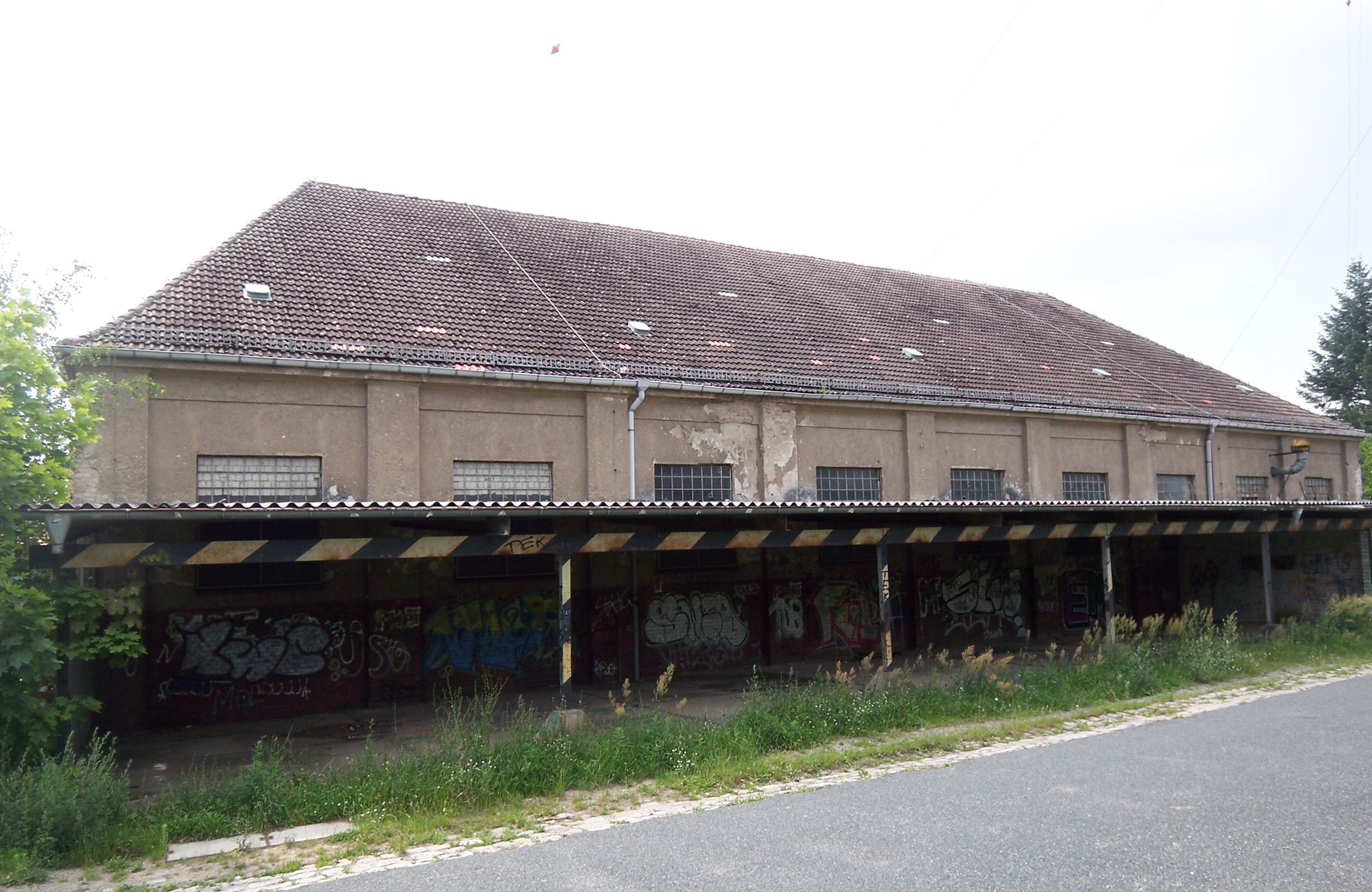 Königs Wusterhausen, Funkerberg. Ehem. Reithalle vor der Sanierung, 2012.